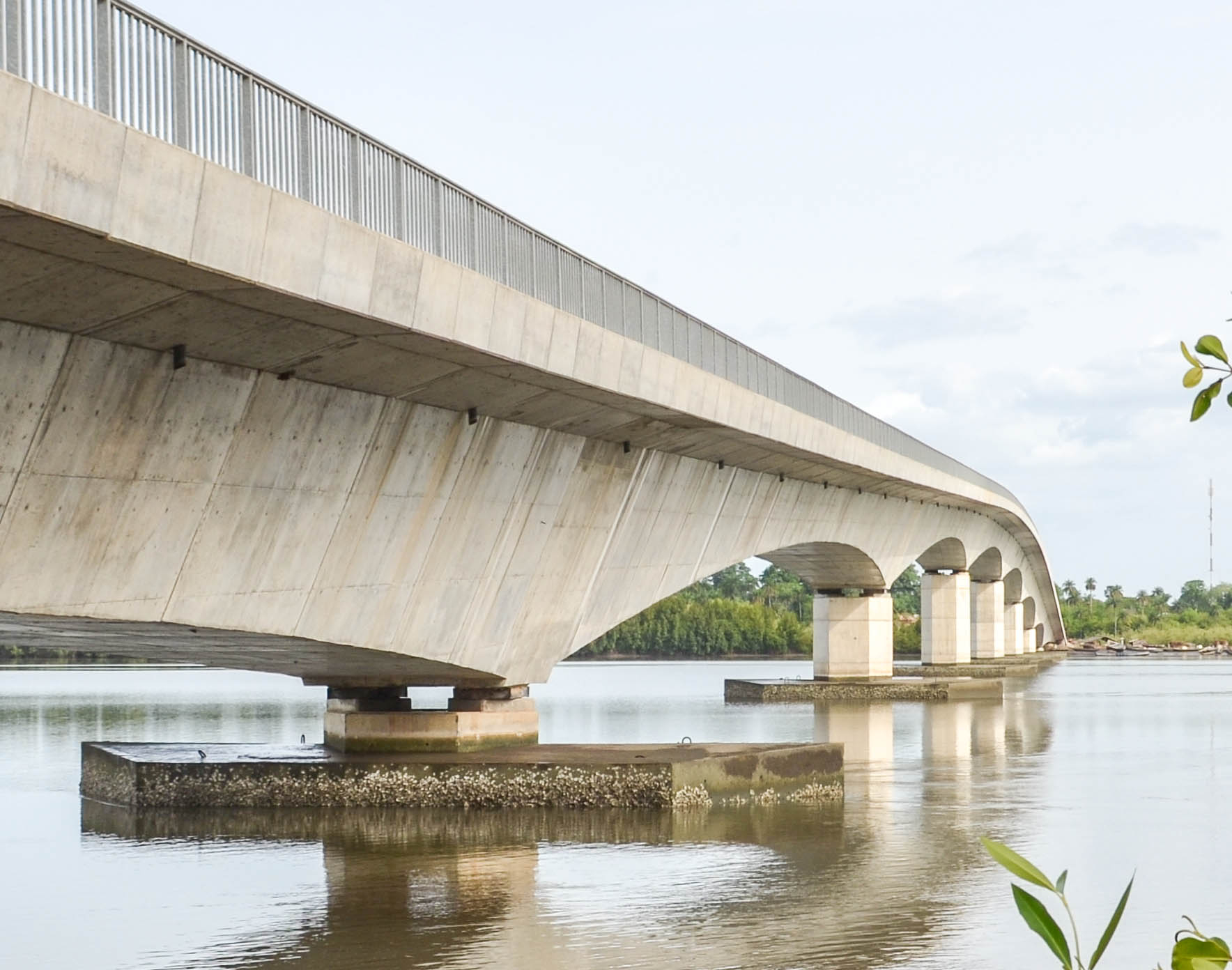 Guinea-bissau